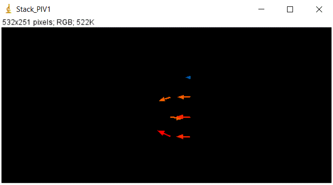 Imagej